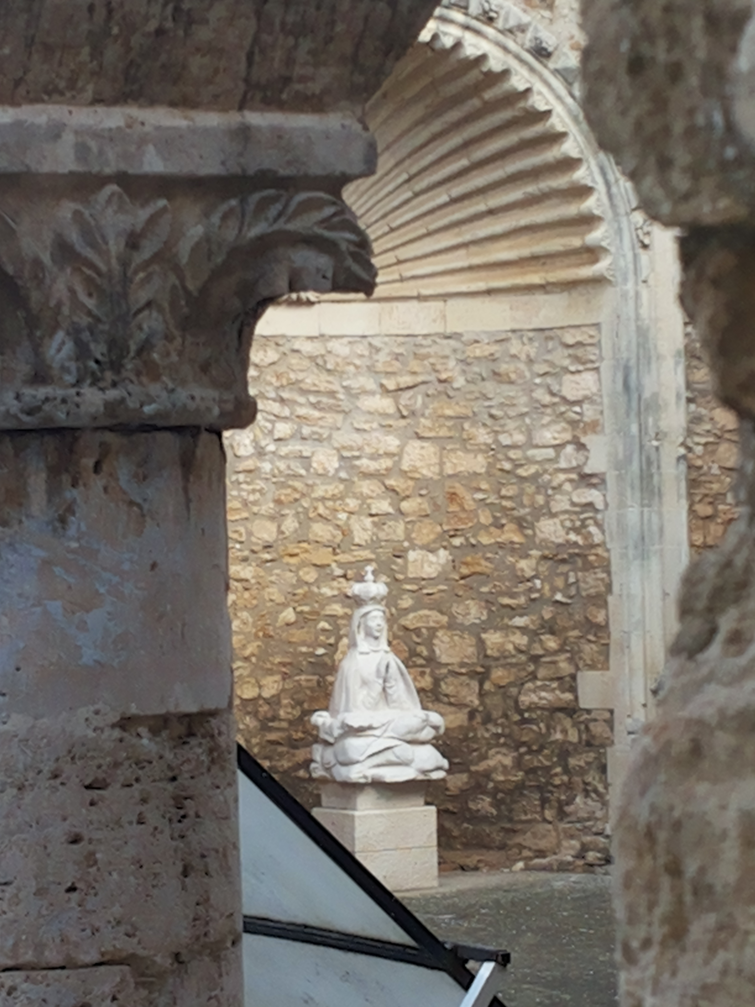 Cappella del patronato di Francesco Lombardo del 1602 con Statua della Madonna